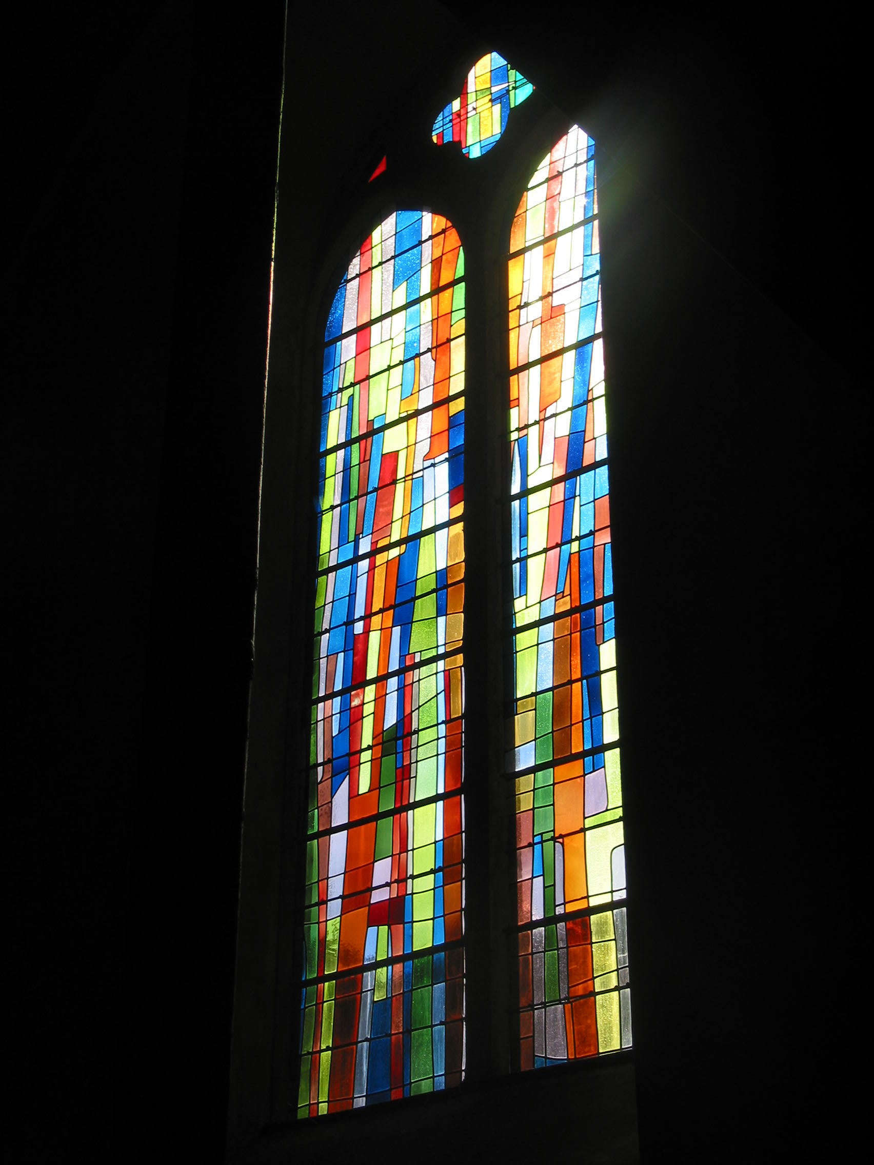 Eglise de Sainte-Suzanne, vitraux Alain de Bourgues